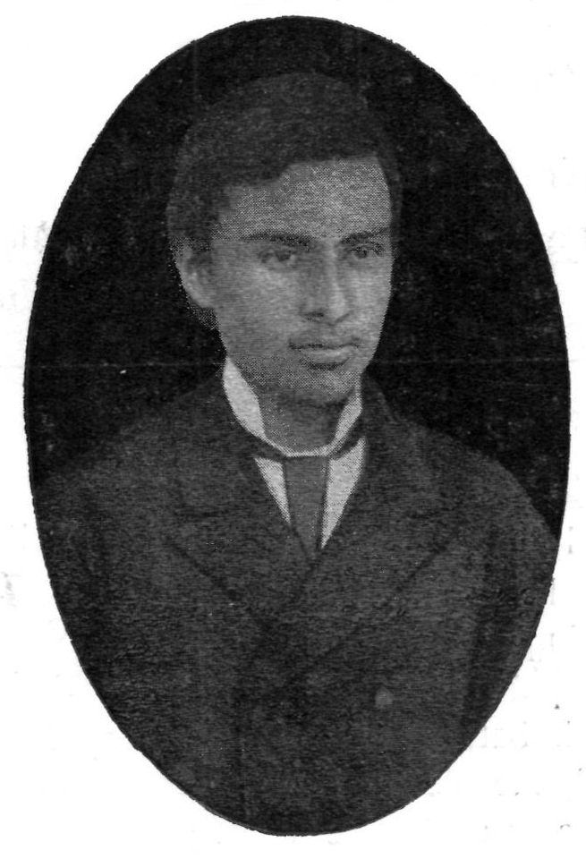 George Coșbuc román költő, újságíró fiatalkorában